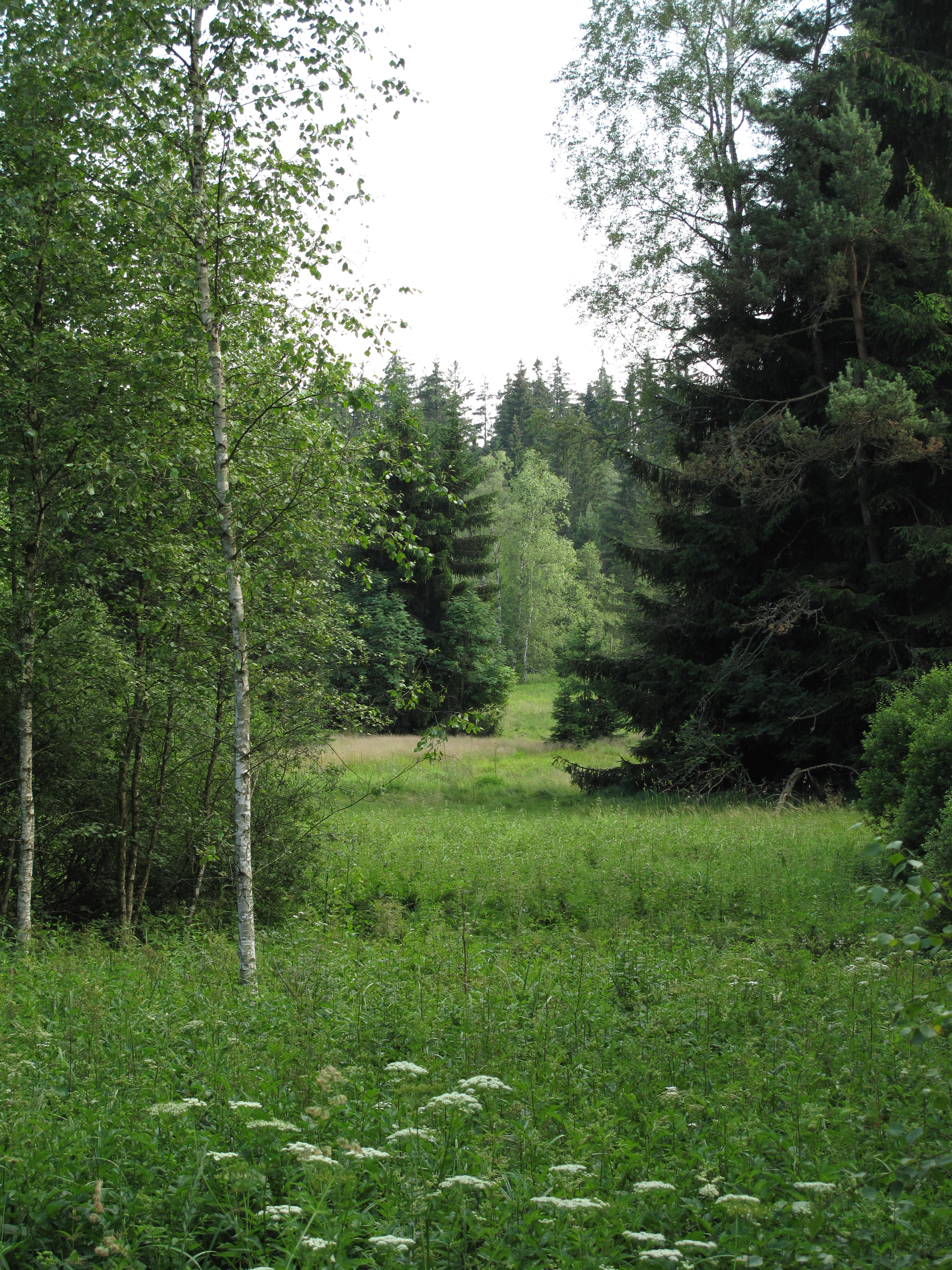 Přírodní rezervace Niva Horského potoka. Okres Český Krumlov, Česká republika.